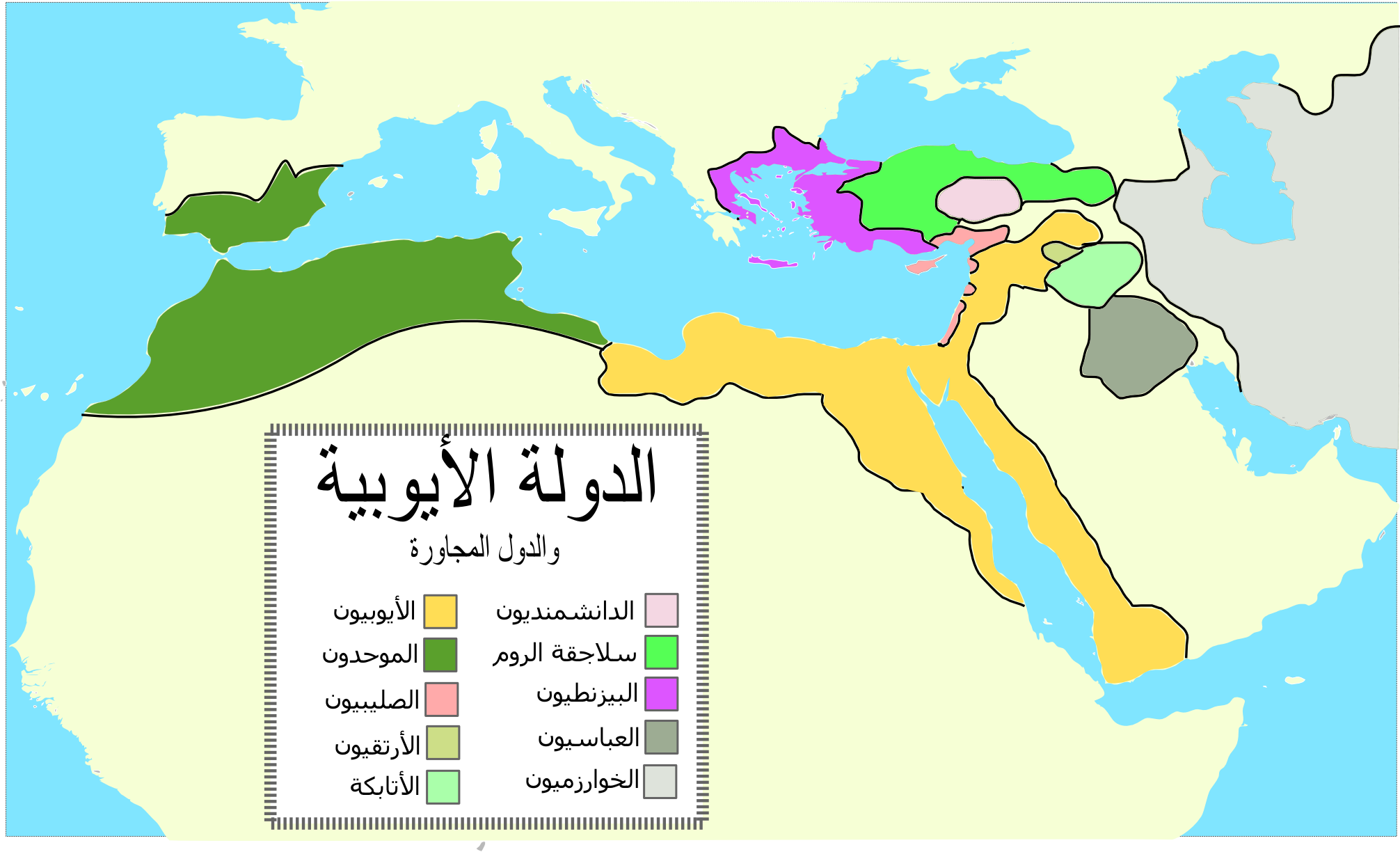 خريطة الدولة الأيوبيّة والدول المجاورة خلال القرن الثاني عشر.